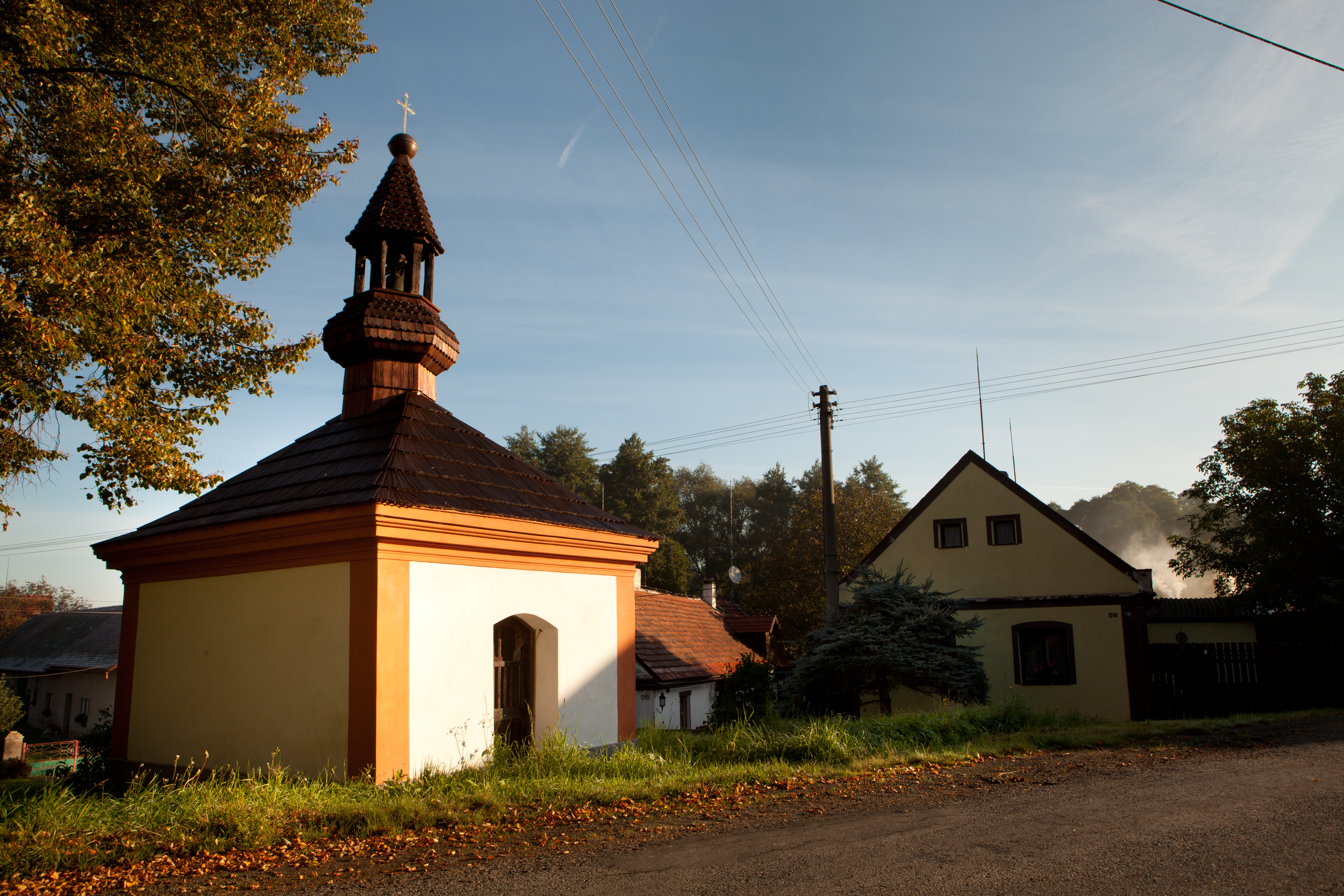 Kaplička (Kosobody), JV část návsi, před čp. 24, Kosobody